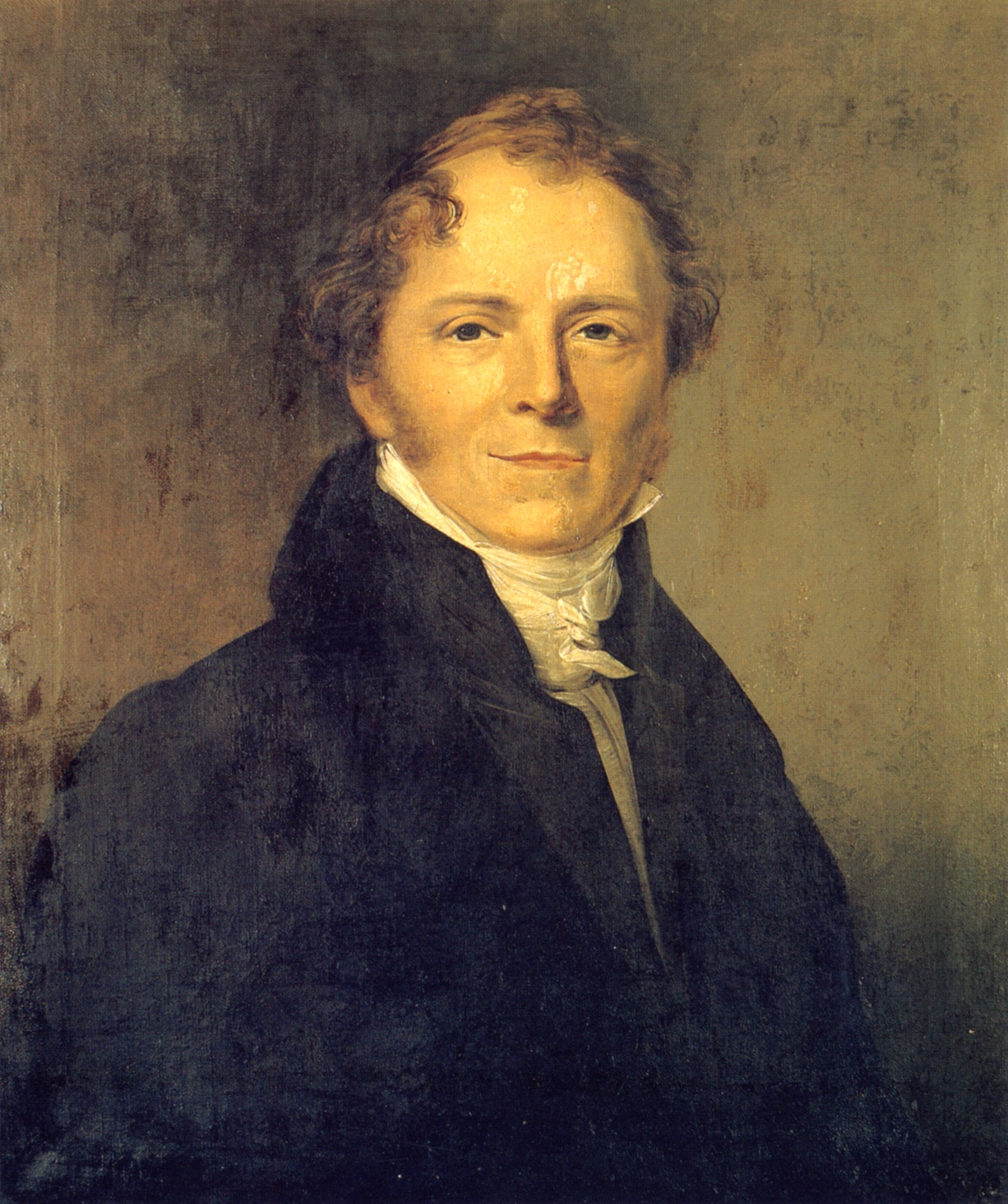 Friedrich Ernst Ballhorn-Rosen, Ölgemälde eines unbekannten Künstlers, um 1820